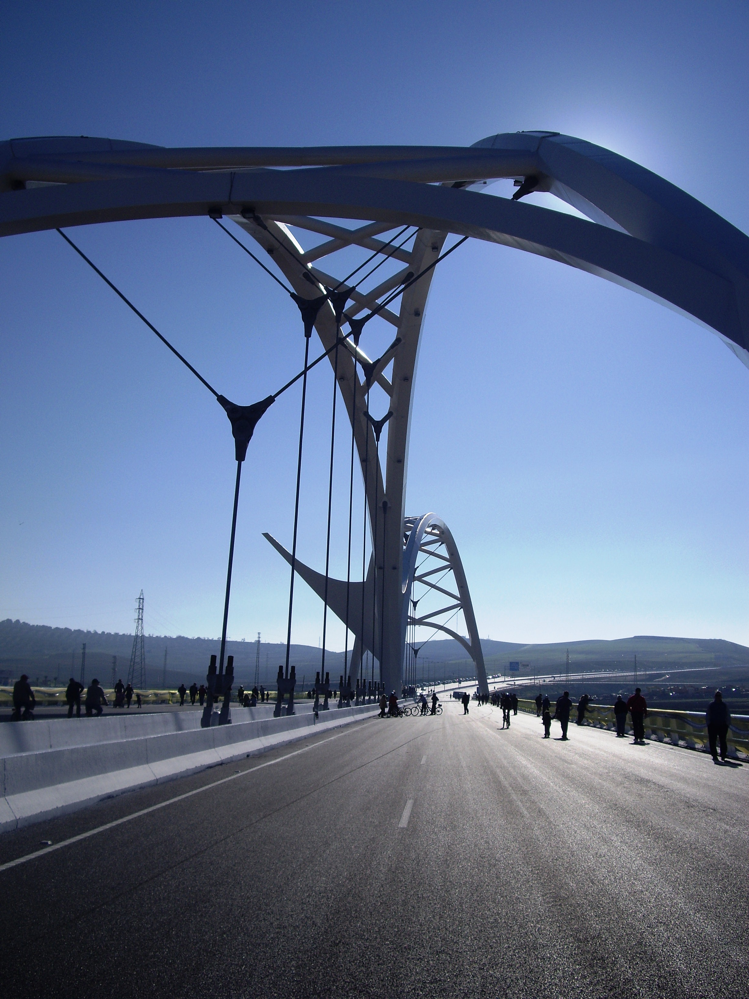 Fotografía del puente de Abbás Ibn Firnás, en Córdoba (España), el día de su puesta en marcha el 15 de enero de 2011